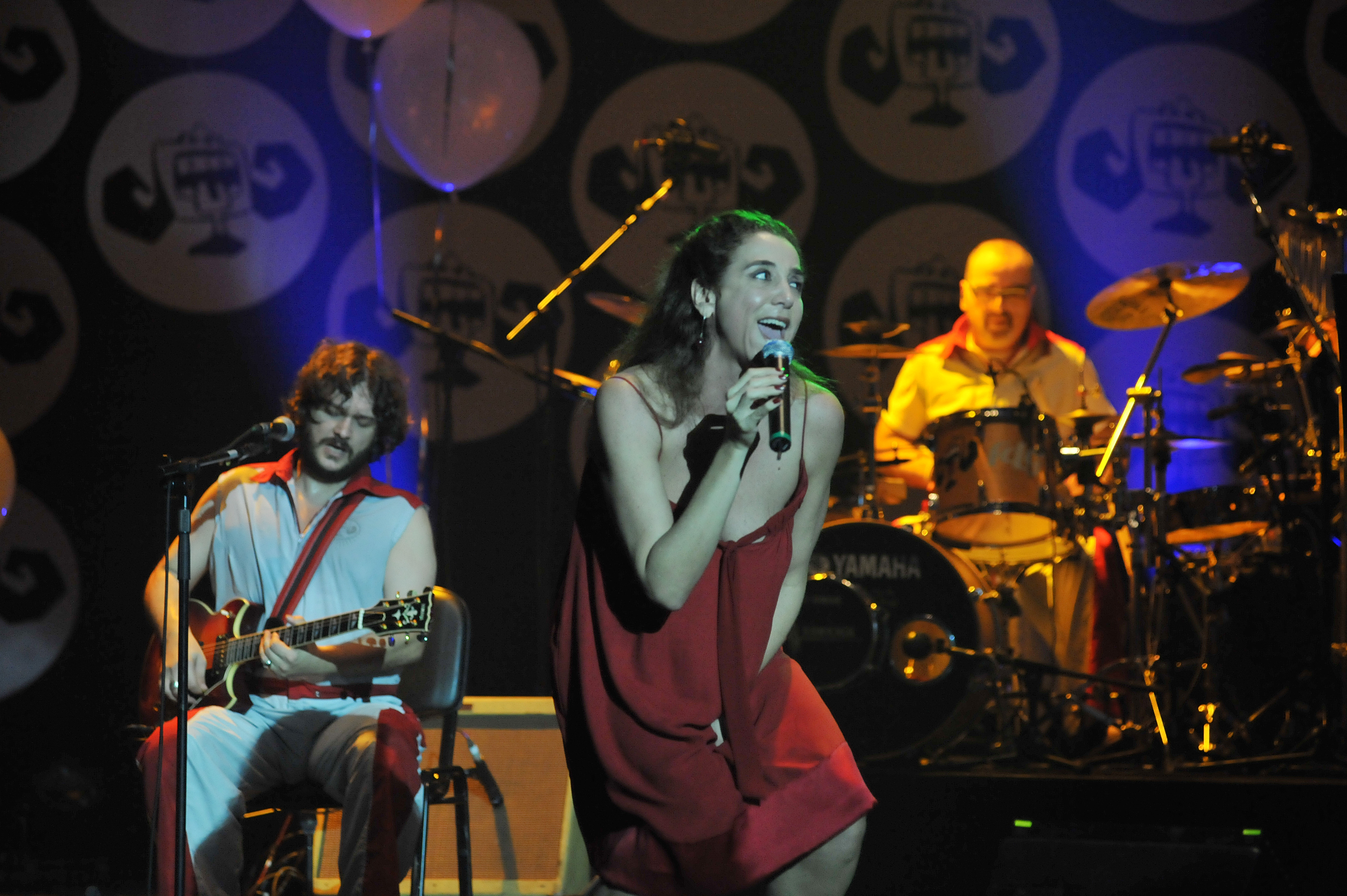 Funk Como Le Gusta e Marisa Orth no Auditório Ibirapuera. São Paulo. Brasil. 22/03/2009.